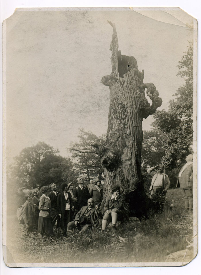 Közvetlenül a Normafa halála előtt készült amatőr felvétel